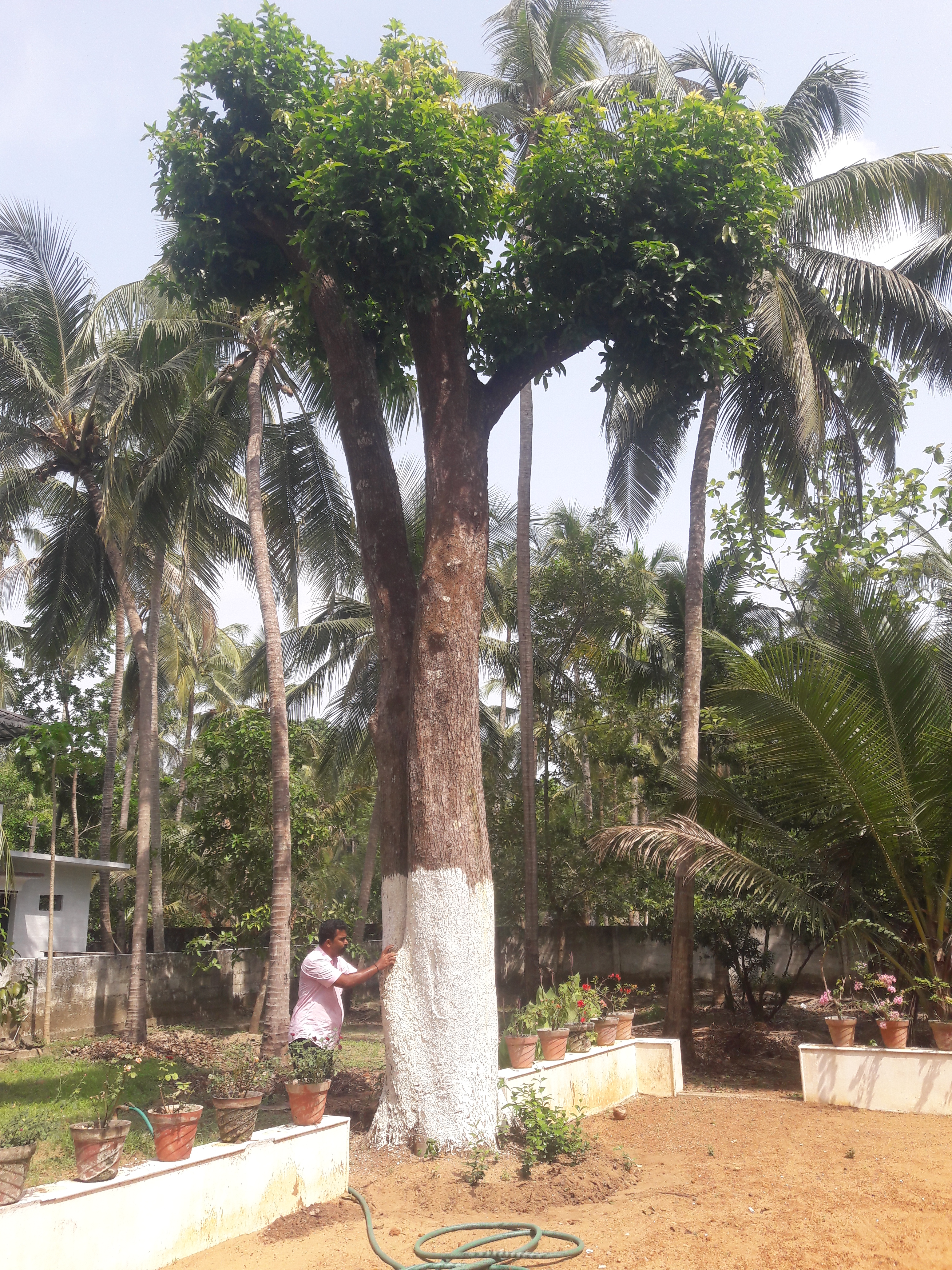 മരങ്ങളിലെ പുനർ യൗവന പ്രക്രിയയ്ക്ക് ശേഷം ഇലകള്‍ വളരുന്ന മാവ്.